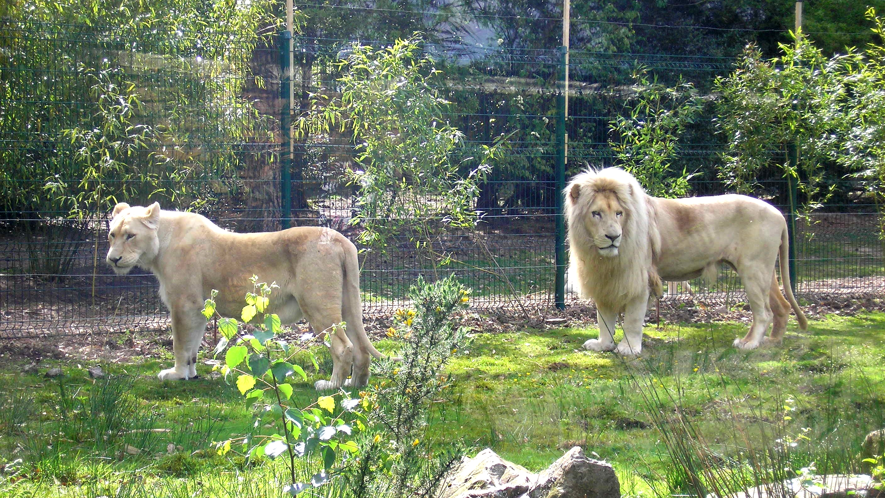 Jurques (Normandie, France). Lions blancs du zoo.